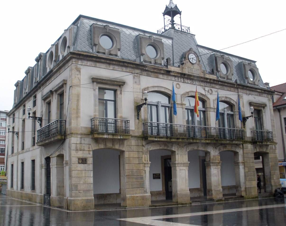 Pola de Siero - Ayuntamiento